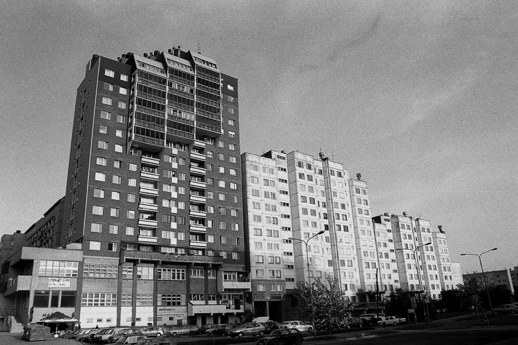 Wrocław - bloki przy ul. Drzewieckiego.